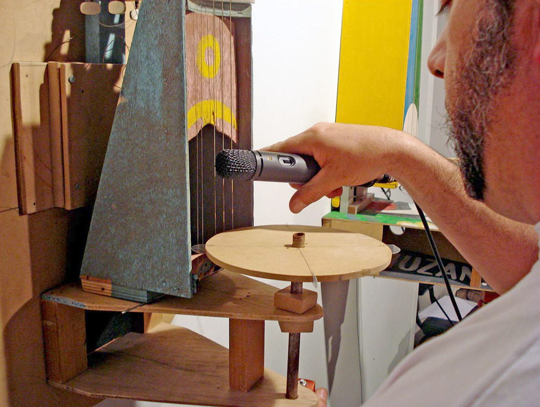 Obra interativa de Chico Machado. O artista está na foto. Museu do Trabalho, Porto Alegre.